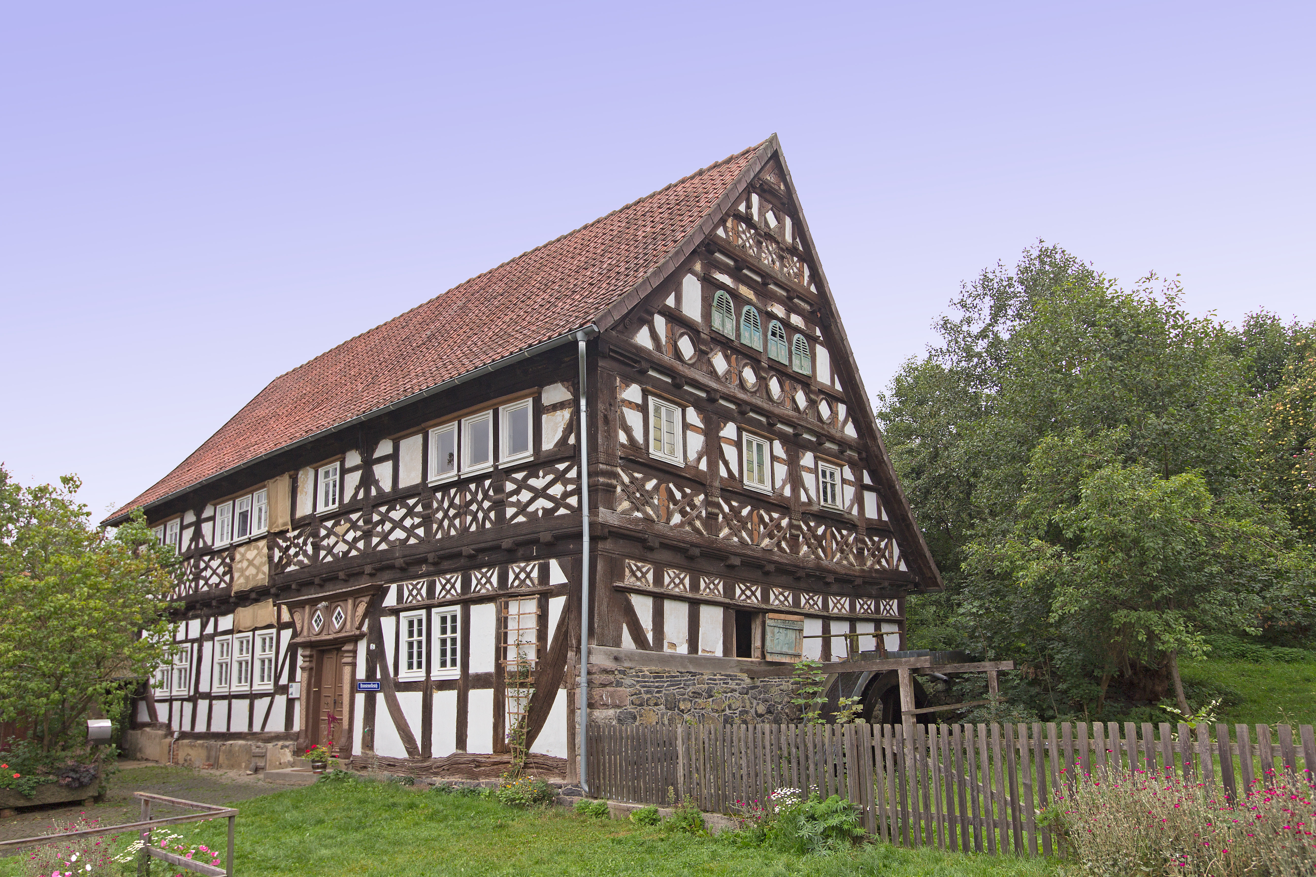 Teufelsmühle in Ilbeshausen im Vogelsberg.